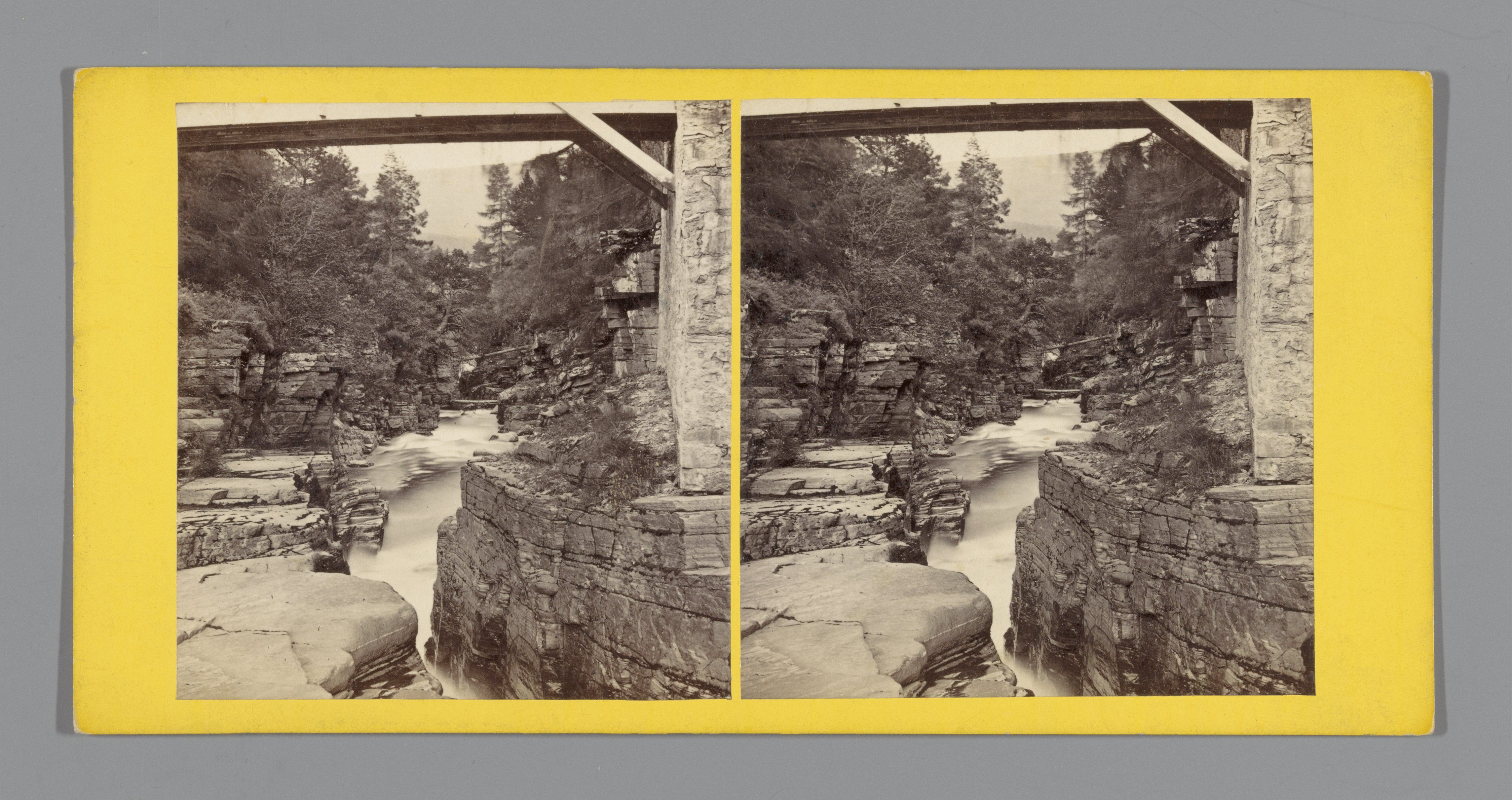 IdentificatieTitel(s): Watervallen van de Quoich nabij BraemarLinn of Quoich, Braemar (titel op object)Objecttype: stereofoto Objectnummer: RP-F-F04791Opschriften / Merken: nummer, verso, gedrukt: ‘No. 35 A.’naam, verso, gedrukt: ‘Registered G. W. Wilson, Photographer, Aberdeen’VervaardigingVervaardiger: fotograaf: George Washington Wilson (vermeld op object)Plaats vervaardiging: AberdeenshireDatering: ca. 1850 - ca. 1880Fysieke kenmerken: albuminedrukMateriaal: karton fotopapier Techniek: albuminedrukAfmetingen: secundaire drager: h 85 mm × b 170 mmOnderwerpWat: rapidsravine, chasm, abyss, canyonWaar: AberdeenshireVerwerving en rechtenVerwerving: overdracht van beheer 1994Copyright: Publiek domein